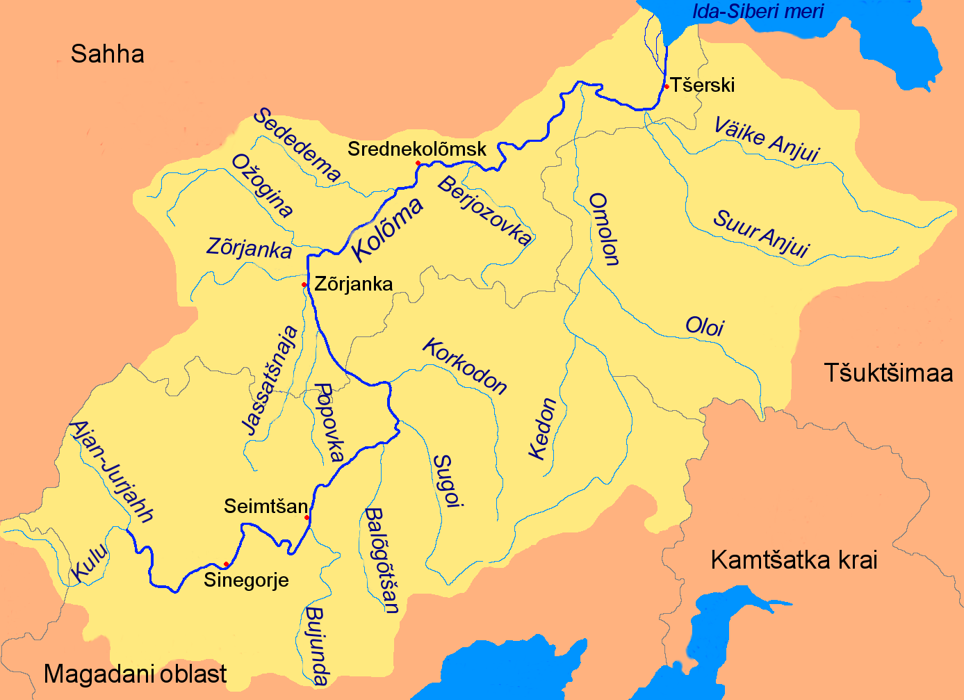 Kolõma jõgi